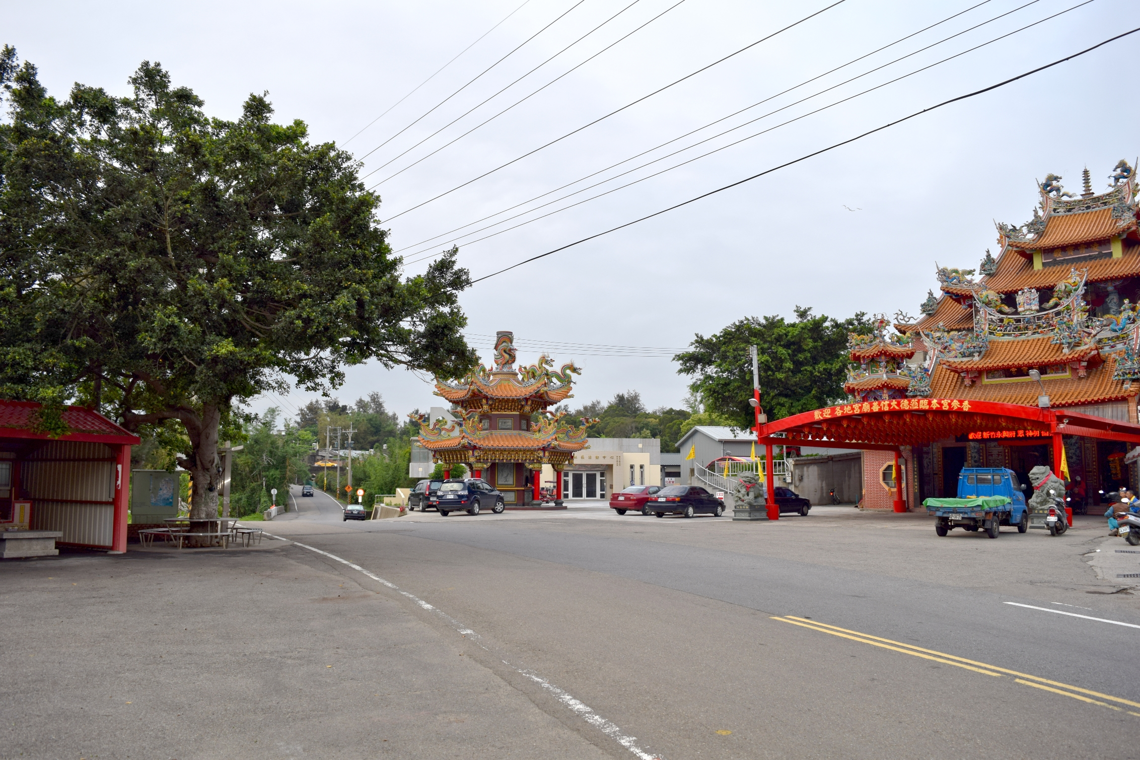 中文（台灣）: 後龍福寧宮